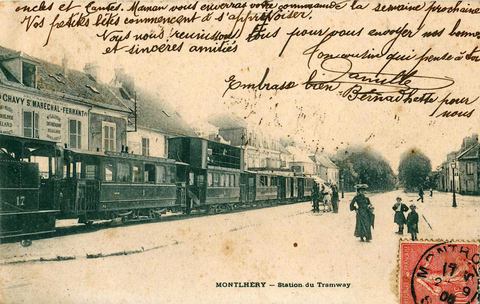 Carte postale sans mention d'éditeur : MONTLHÉRY - Station du Tramway (Arpajonnais).